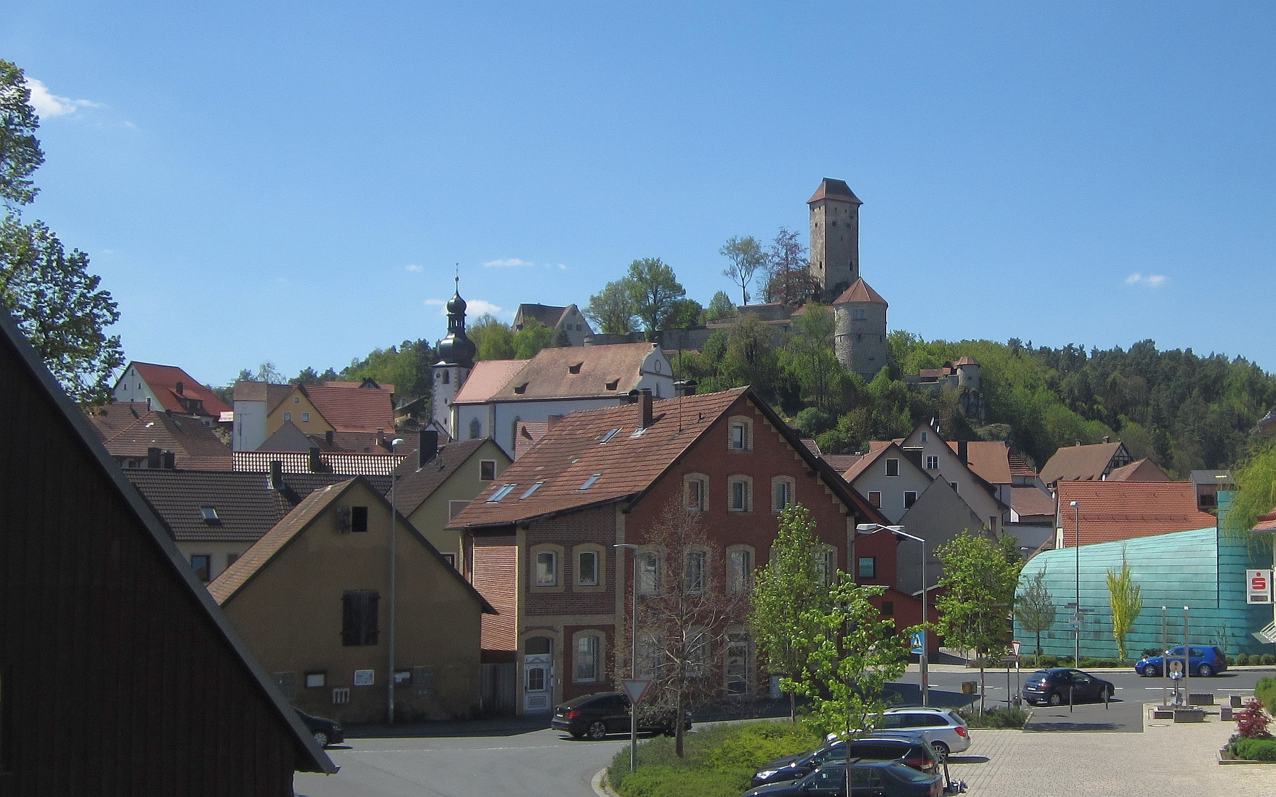 Neuhaus a.d. Pegnitz im Mai 2016